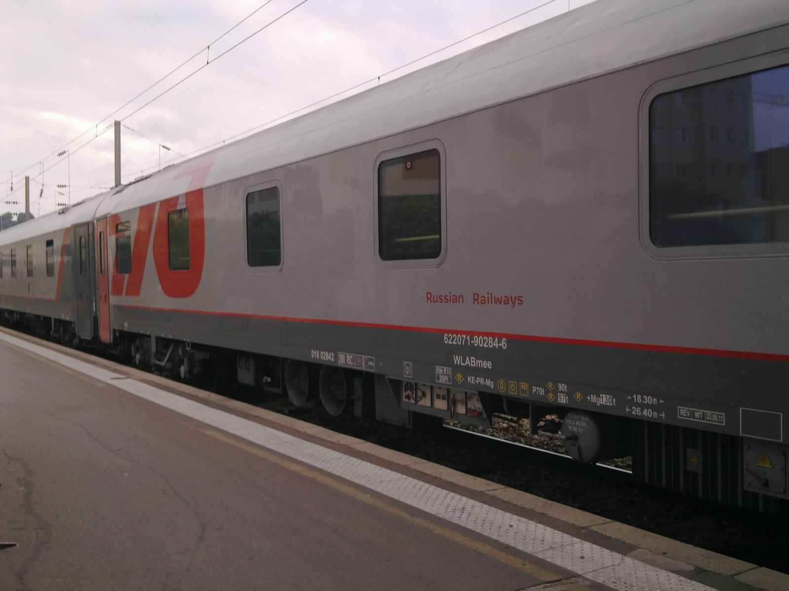 Riviera Express (train). Une voiture des chemins de fer Russes composant le Riviera Express en gare de Nice-ville